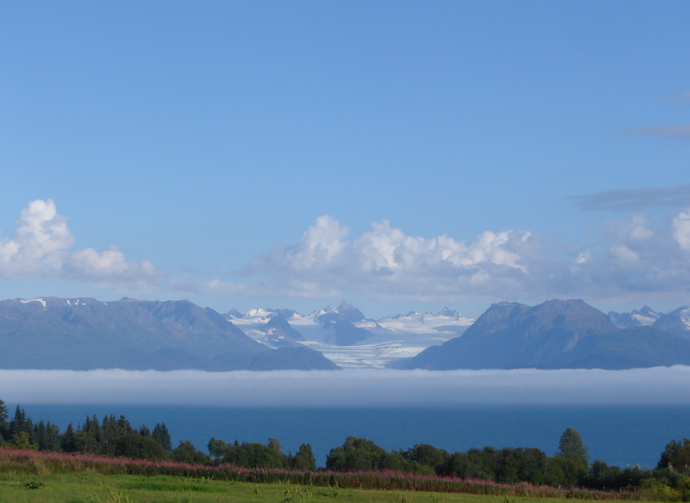 Fog bank over Kachemak Bay